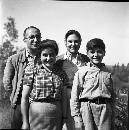 1944- סרני מצטלם לפני יציאתו לשליחות באירופה: מימין לשמאל: דניאל, עדה, הגר ואנצ'ו סרני